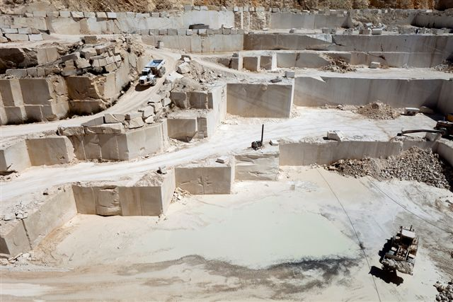 “Cantera Matagallar” de piedra oomicrita en el municipio de Pedrera (Sevilla, España)